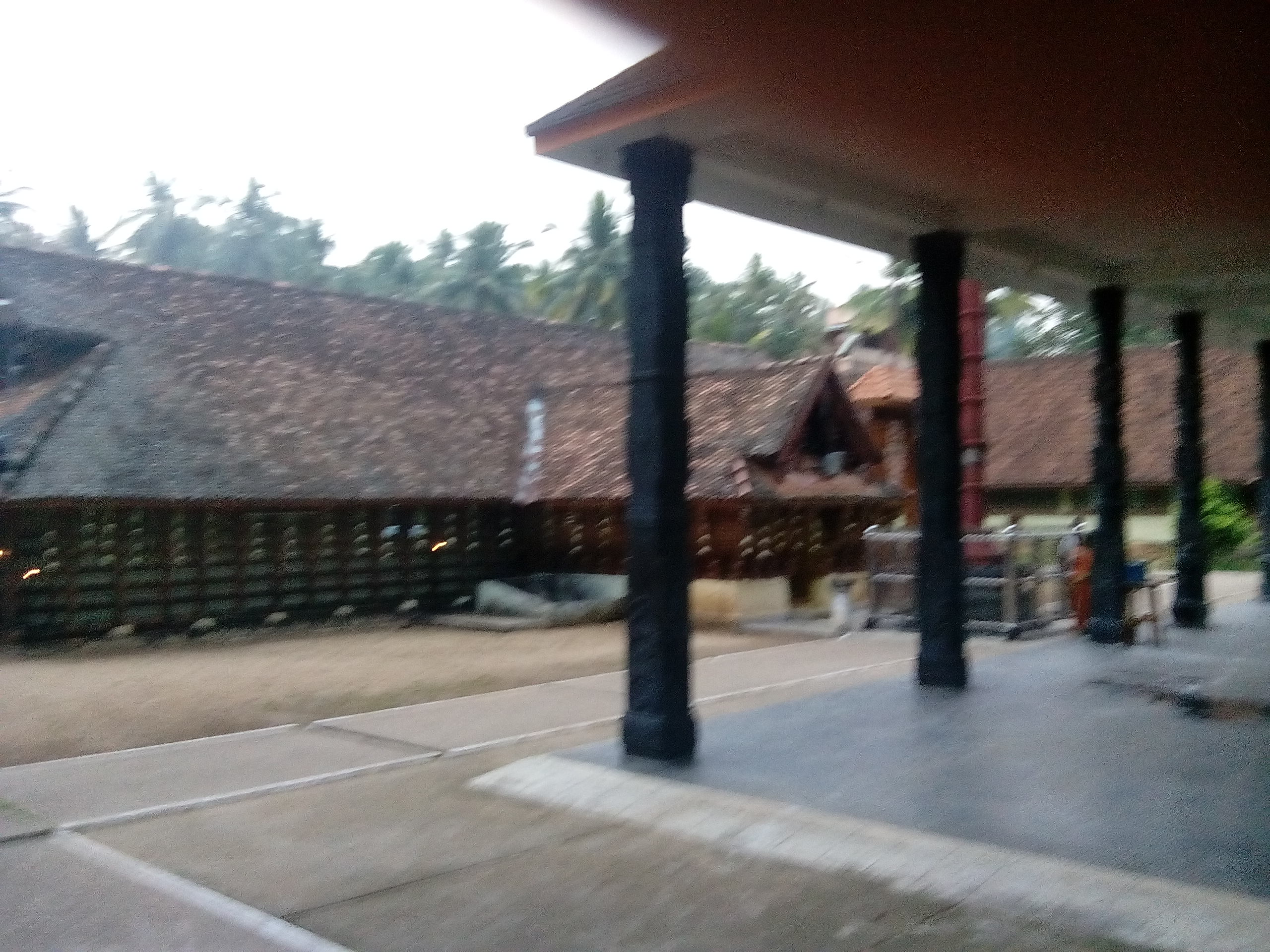 the view of kochulloor balasubrahmanya temple from side road, thiruvananthapuram